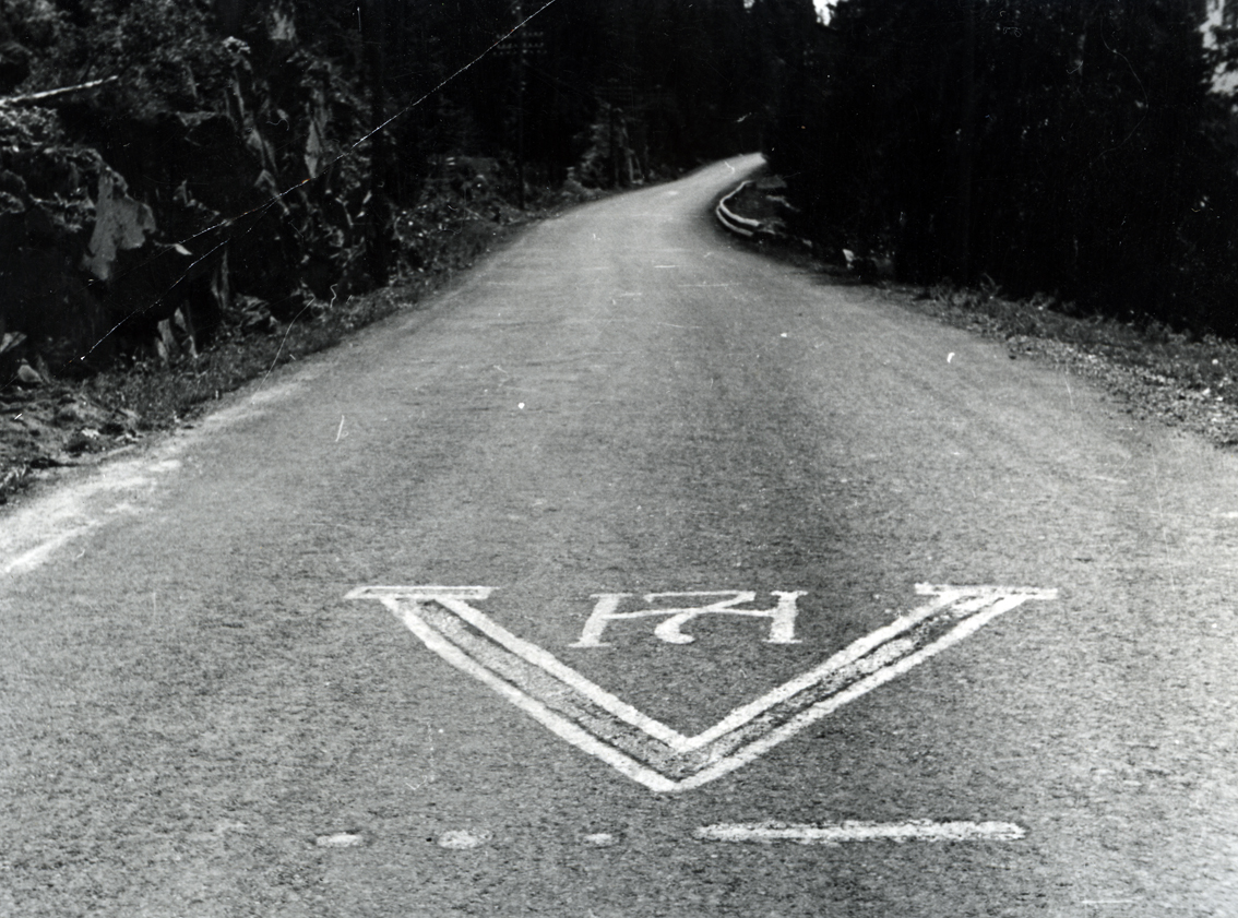 Beskivelse: Foto i konvolutt fra NTBs krigsarkiv, konvolutten merket med teksten: ”Overalt i Norge kan man finne V-tegn, H7-tegn eller Leve Kongen. De finnes på alle plasser, så det er ikke vanskelig å skjønne hvor nordmennenes hjerter er.” Fotoet stammer fra NTBs krigsarkiv og dokumenterer nordmenns protest mot NS og okkupasjonsmyndighetene i krigsprene 1940-1945. NTBs krigsarkiv består av en samling fotografier fra blant annet Regjeringens Informasjonskontor i London, Pressekontoret i Stockholm og Norsk Telegrambyrå i Oslo. Arkivet inneholder over 50 000 bilder og negativer fra 2. verdenskrig. Arkivreferanse: Riskarkivet, PA-1209_Ue110_004, NTBs krigsarkiv, Ue 110. HAAKON 7 PAINTED ON THE ROAD Photo in an envelope from NTB’s war archive, the envelope is marked with the text: “Everywhere in Norway you can find V symbols, H7 symbols or “Long live the King”. They are everywhere, so it is not hard to understand where the Norwegians’ hearts are.” The photo comes from the NTB’s war archive and documents the Norwegians’ protest against the NS (nazi party) and the occupation forces during the war years 1940-45. NTB’s war archive consists of a photo collection from the Norwegian government’s information office in London, the Press Office in Stockholm and Norsk Telegrambyrå in Oslo. The archive contains more than 50 000 photos and negatives from WWII.